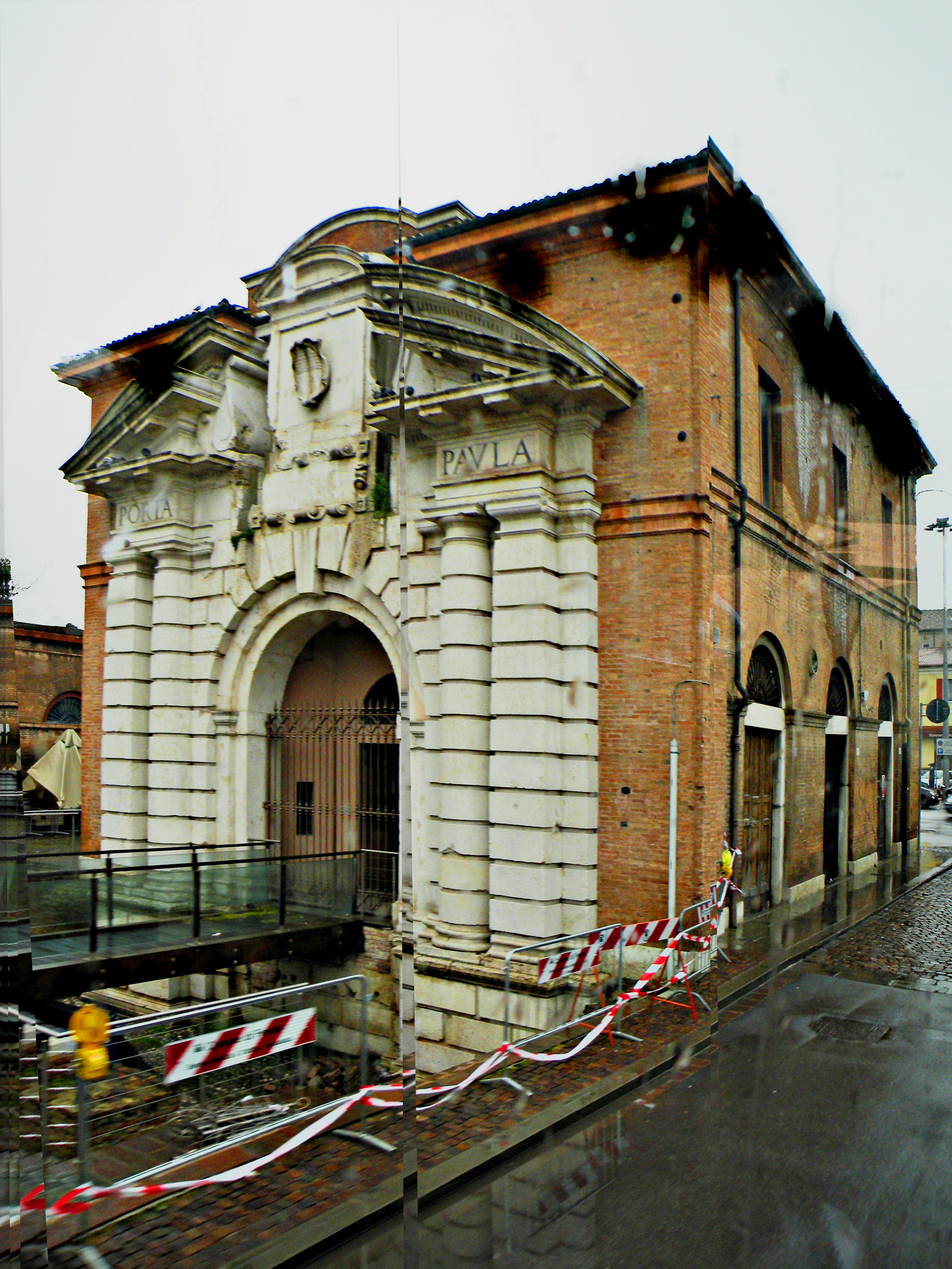 Городские ворота Феррары